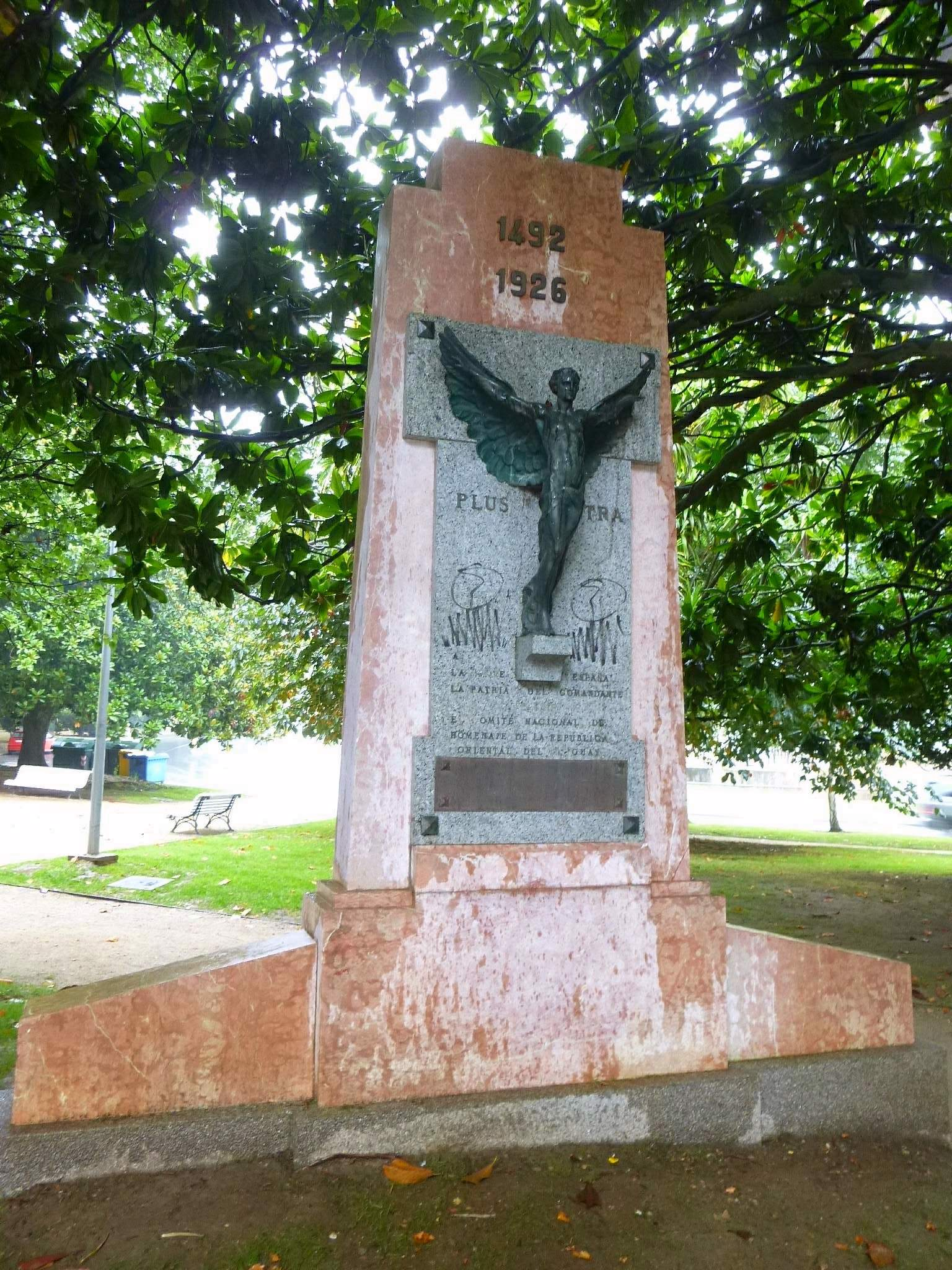 Ferrol - Cantón de Molíns y Alameda de Suanzes